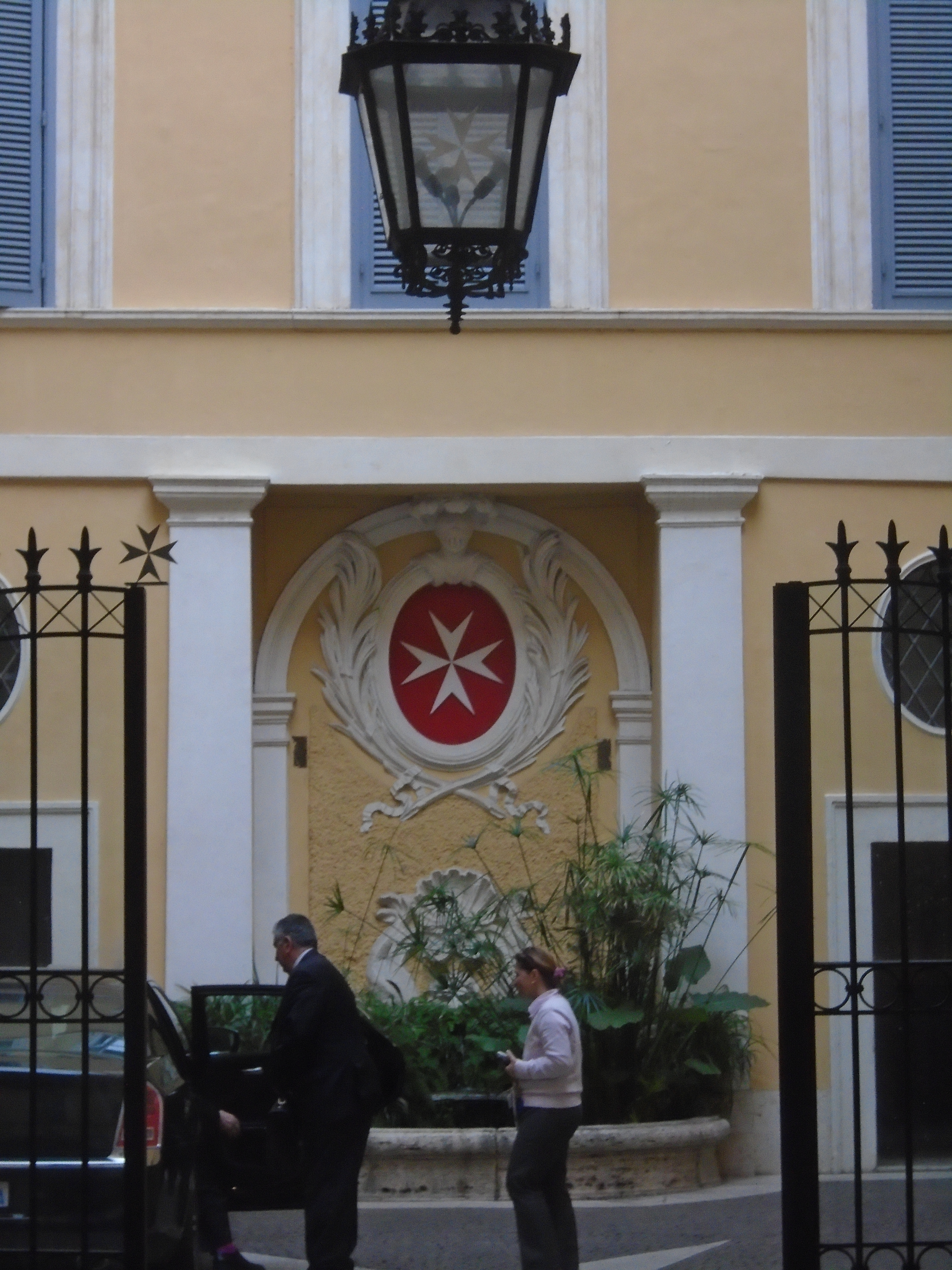 Rome servitiu